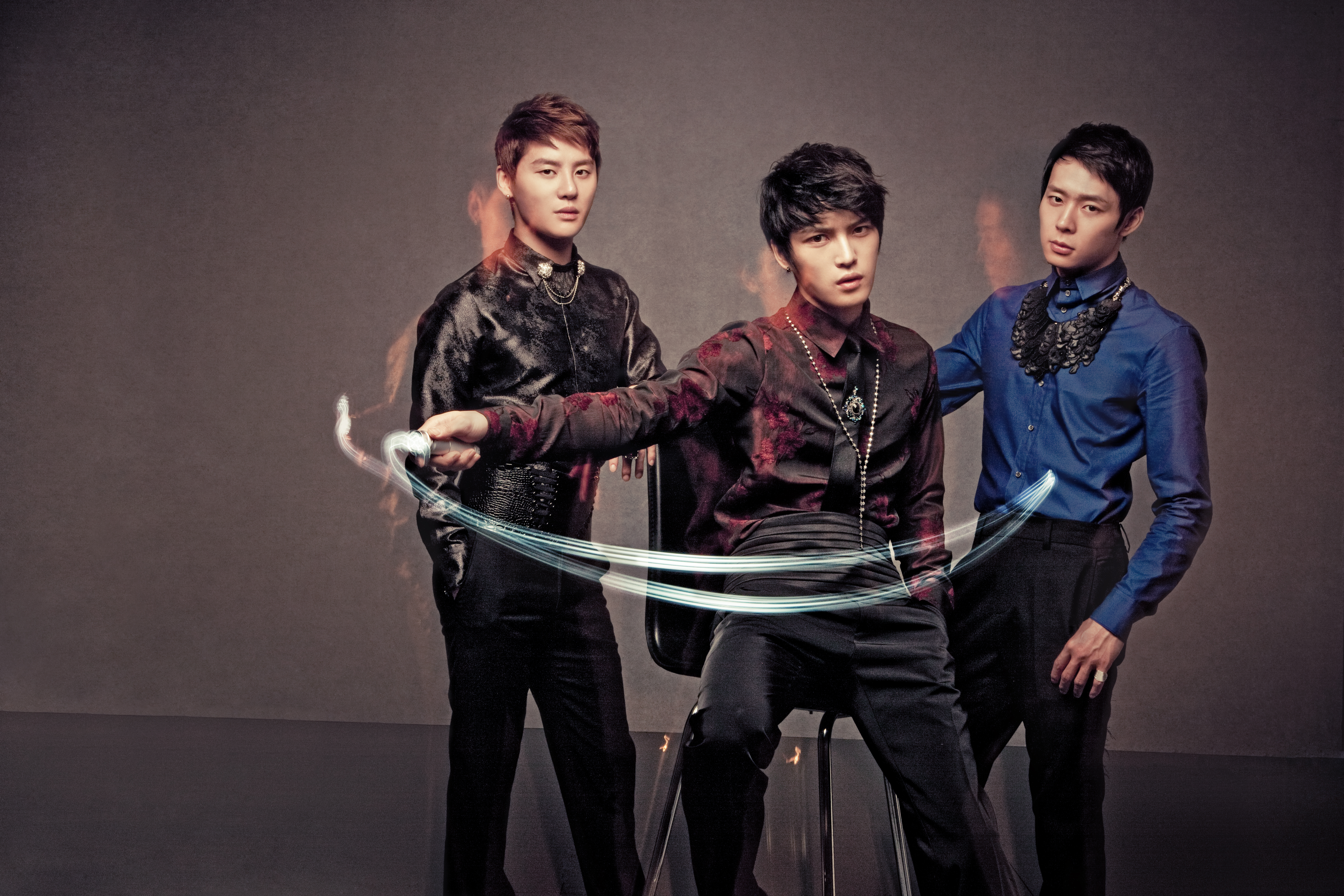 LG 옵티머스 Q2 광고 사진 - JYJ